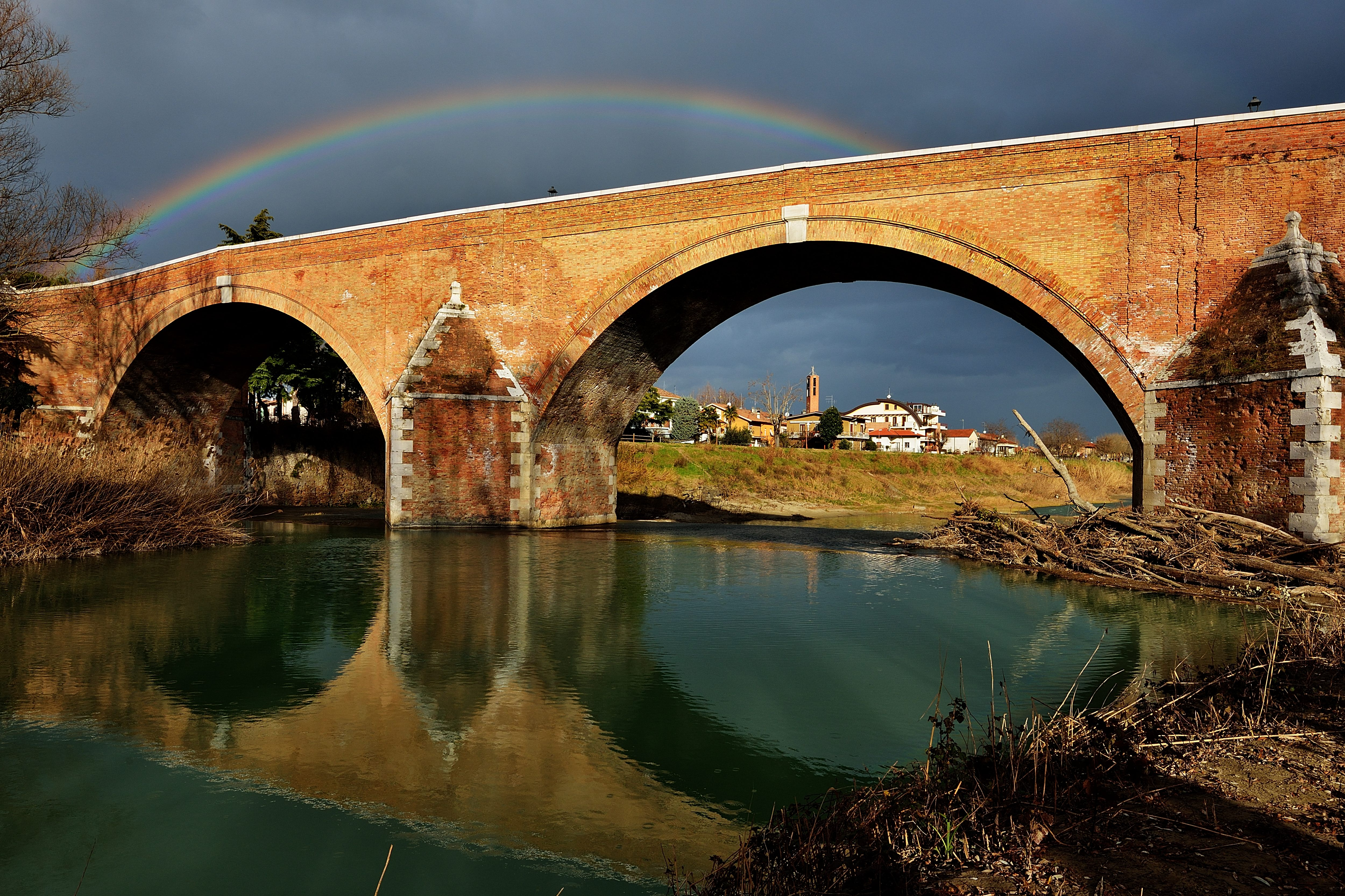 Ponte Clemente detto Vecchio This is a photo of a monument which is part of cultural heritage of Italy.